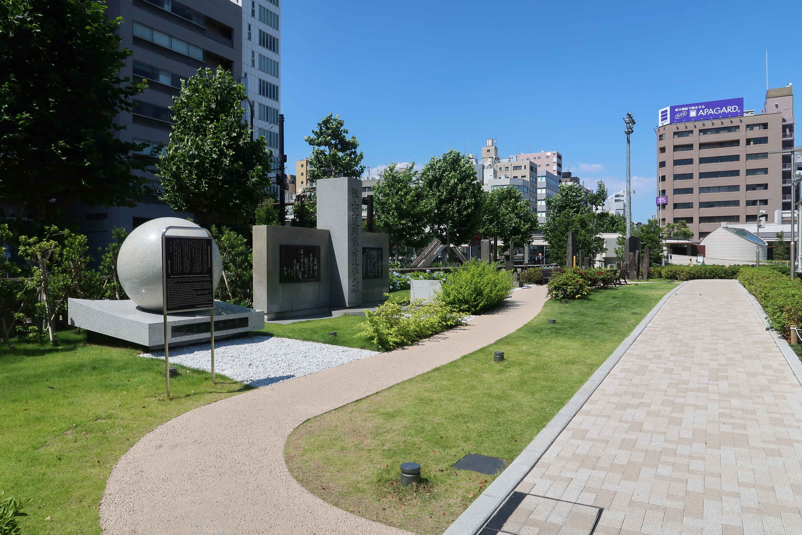 Tsukiji Hongan-ji